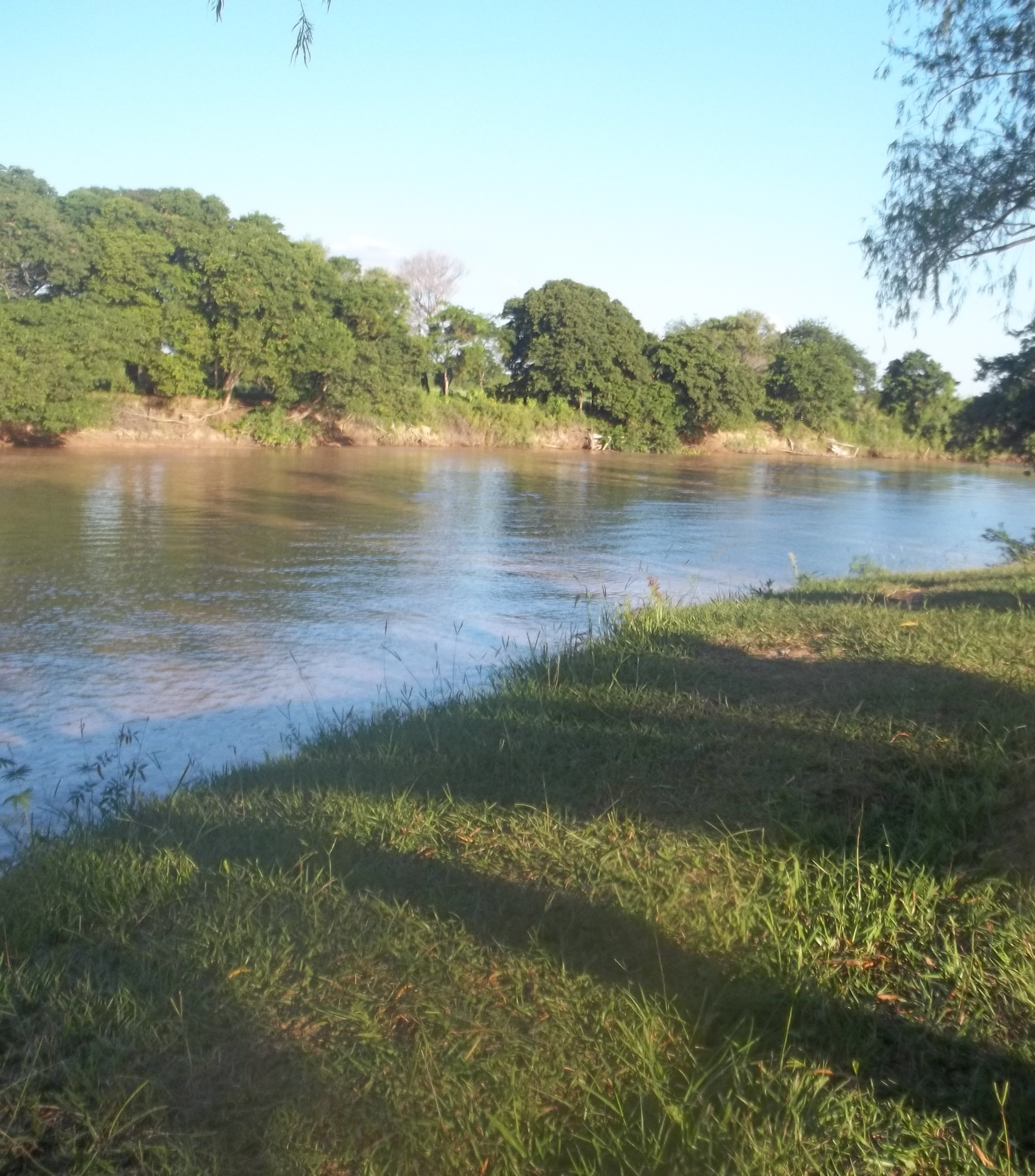 Riacho antequeras y parte del parquizado de guardería náutica